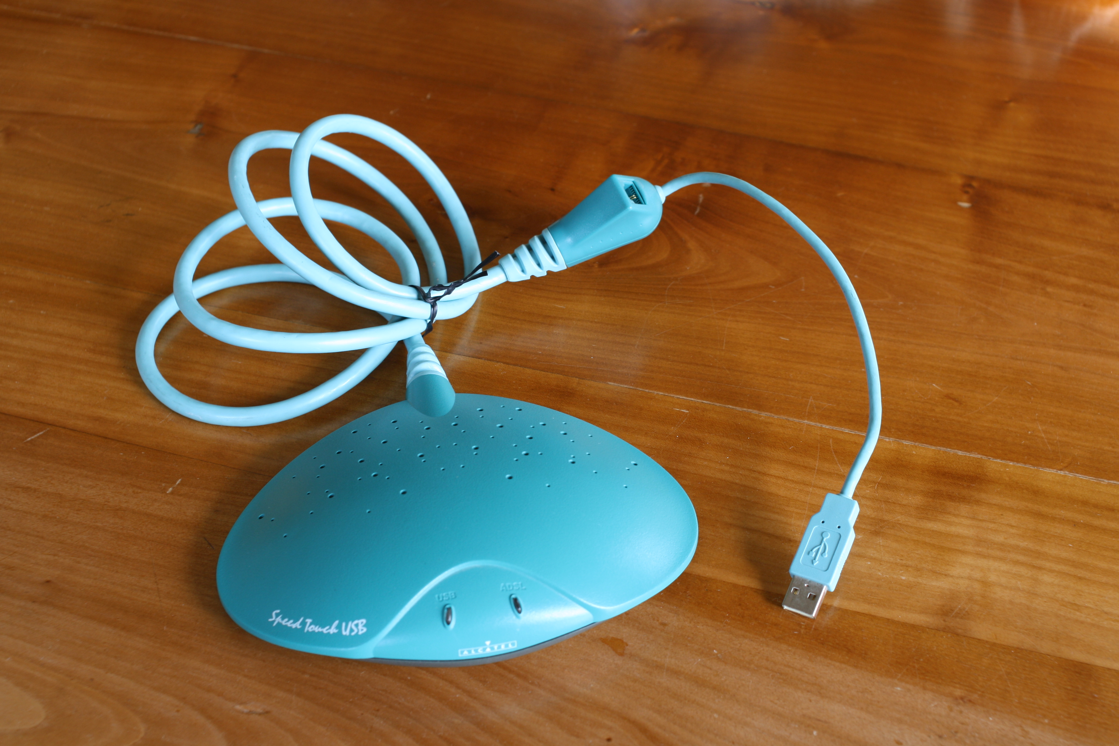 Modem ADSL ALCATEL SpeedTouch USB, dit "raie manta"